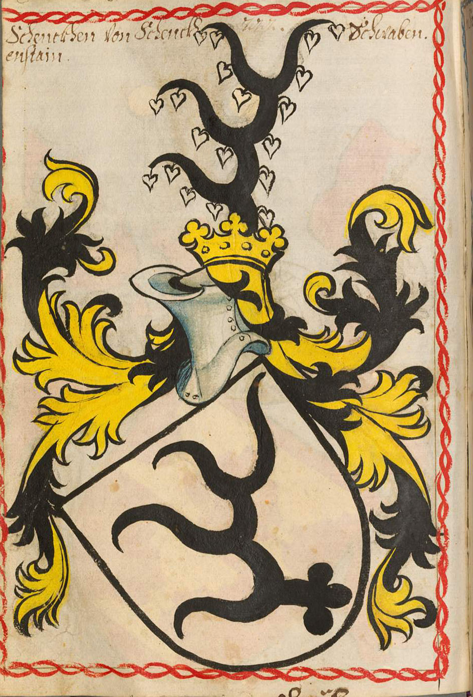 Scheibler'sches Wappenbuch, älterer Teil Schenken von Schenkenstein